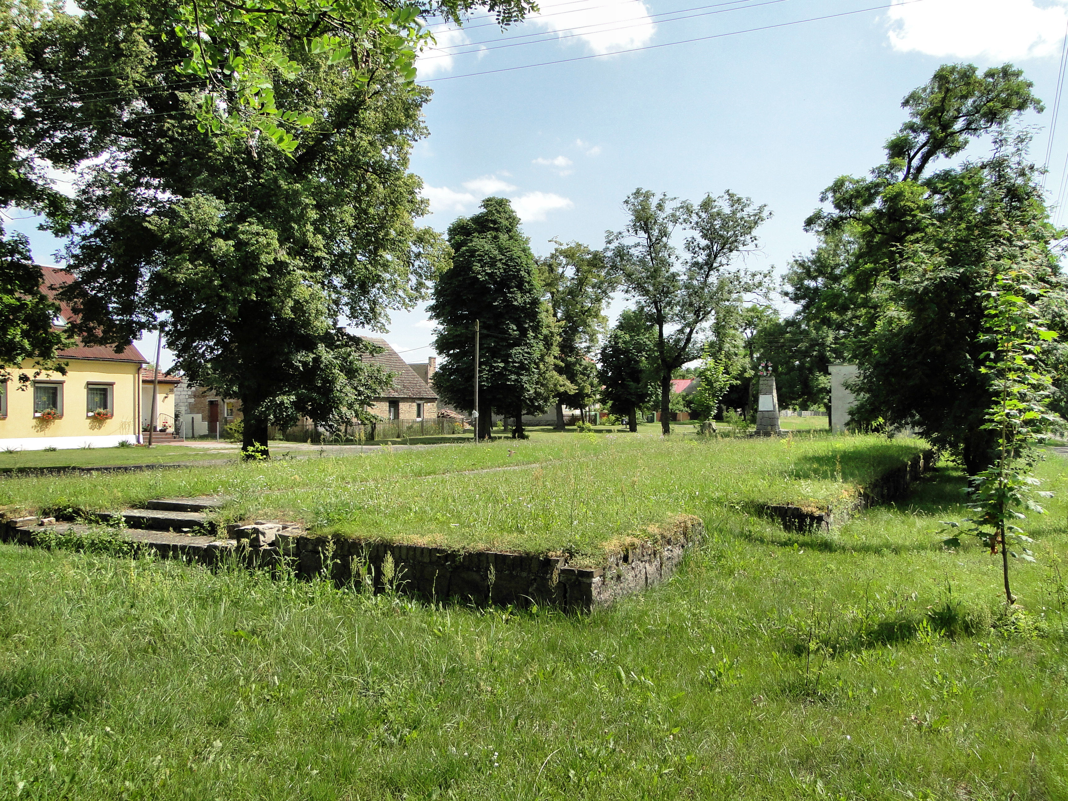 Pyrzany. Fundamenty rozebranego kościoła